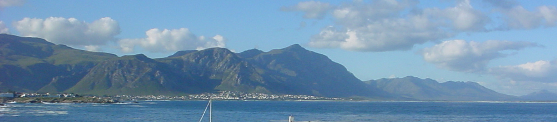 Kleinriviersberge, June 2004